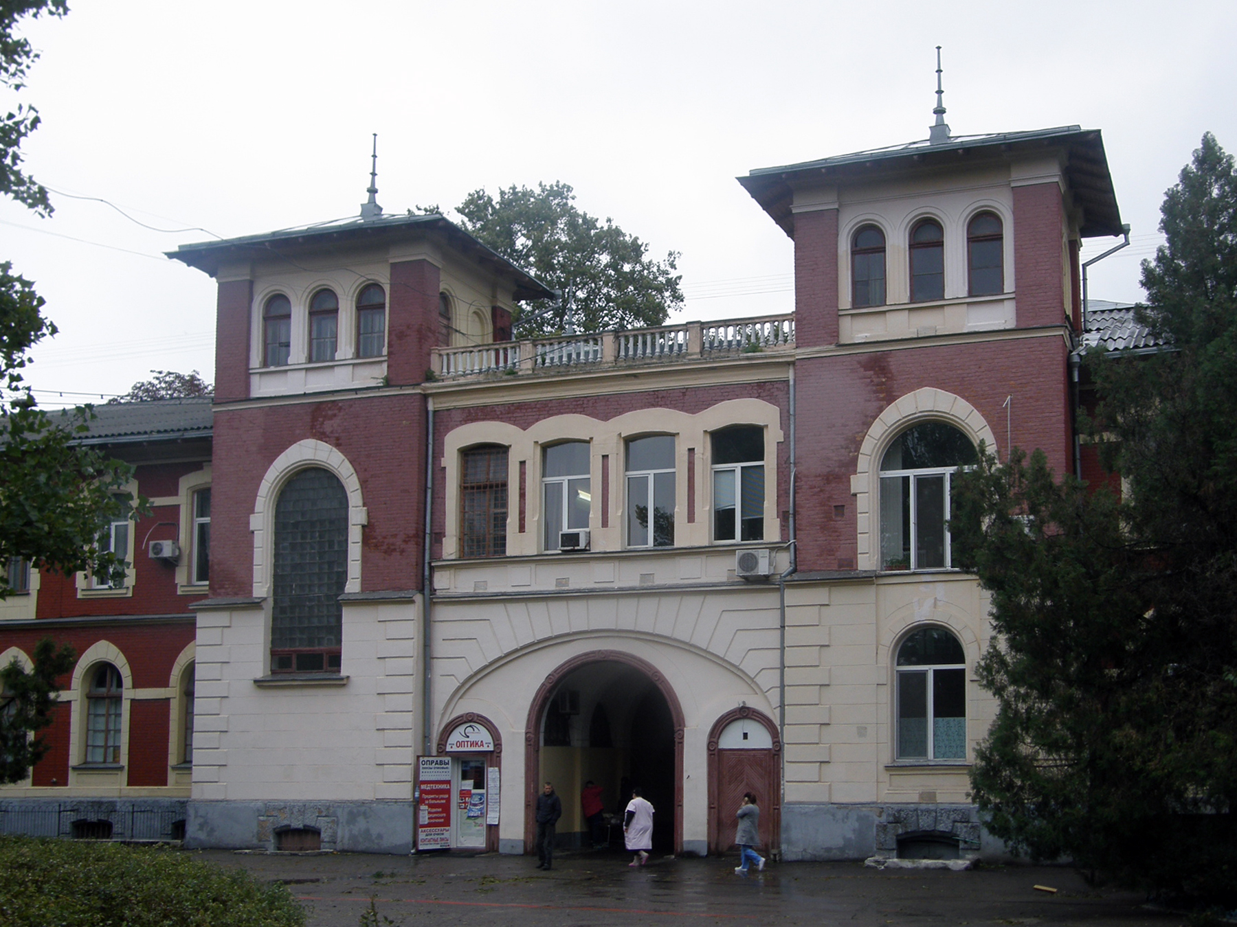 внутренний фасад приёмного отделения городской больницы № 11, Одесса